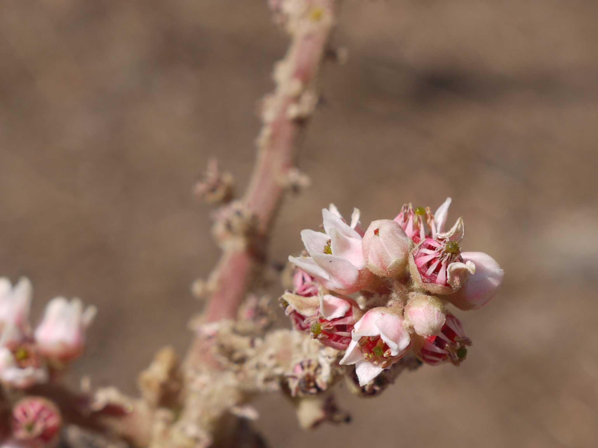 Burseraceae (incense or torchwood family) » Boswellia serrata bos-WELL-ee-a -- named for John Boswell, Scottish botanist and FRCP of Edinburgh sair-AY-tuh or ser-RAT-uh -- toothed like a saw commonly known as: Indian frankincense tree, Indian olibanum tree, salai tree • Gujarati: સાલેડી saaledi, સલાઈ ગૂગળ salaai gugul • Hindi: शल्लकी shallaki • Kannada: ಗುಗ್ಗುಳ ಮರ guggula mara • Malayalam: കുങ്ങില്യം kungilyam • Marathi: धुपाळी dhupali, धूपसाळी dhupasali, कुरुंद kurunda, सालफळी salaphali, साळई salai, साळी sali • Oriya: salai • Pali: सल्लकी sallaki • Punjabi: ਸਾਲ੍ਹੇ salhe, ਸਾਲਹੀ salhi • Sanskrit: भीषण bhishan, गुग्गुल guggula, हस्तिनशना hastinashana, पालंक palank, पार्वती parvati, ऱ्हादिनी hradini, कुरुन्द kurunda, सल्लकी sallaki, शल्लकी shallaki, स्रुवा sruva • Tamil: குமஞ்சம் kumancam, குங்கிலியம் kunkiliyam, மரத்துவெள்ளை marattu-vellai, பறங்கிச்சாம்பிராணி paranki-c-campi-rani, வெள்ளிக்கீரை vellai-k-kirai • Telugu: గుగ్గిలము guggilamu, పరంగిసాంబ్రాణిచెట్టు parangi-sambrani-chettu, సల్లకి sallaki ... the resin obtained from this tree is commonly known as: Indian olibanum, Indian frankincense, Konkani resin • Arabic: لبان luban • Hindi: कुंदर kundar, लोबान loban, मकन्द makand, मकुन्द makund • Kannada: ಚಿಲಕದೂಪ chilakadupa, ಧೂಪ dhupa, ಗುಗ್ಗುಳ guggula, ಹಾಲು ಮಡ್ಡಿ haalu maddi, ಲೋಬಾನ lobaana, ಪರಮ್ಗಿ ಸಾಮ್ಬ್ರಾಣಿ paramgi saambraani • Konkani: लोभान lobhan • Marathi: लोभान lobhan • Persian: گنده فيروزه gandha firoza, لوبان loban • Punjabi: ਲੋਬਾਣ loban • Sanskrit: द्विज dvija, कुन्दुर kundur, कुन्दुरु kunduru, मुकुन्दः mukundah, पालंकी palanki, पालंक्या palankya, सुरभी surabhi, तुरुष्क turushka • Telugu: కుందురువు kunduruvu • Urdu: لوبان loban Endemic to: India References: Flowers of India • NPGS / GRIN • DDSA